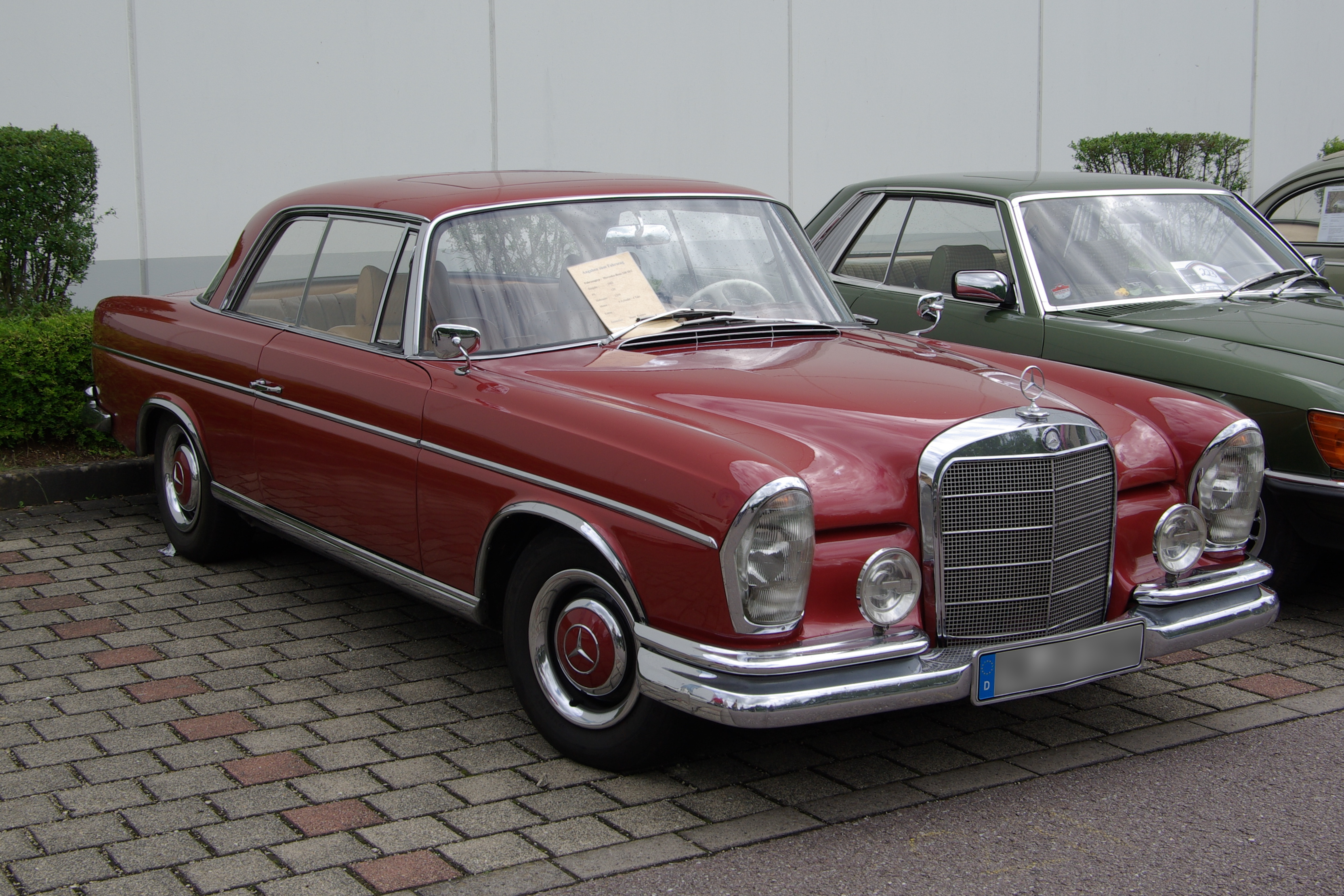 Mercedes-Benz 220 SEC, W 111, Baujahr 1962, 120 PS, 2200 cm³, 28. Internationales Oldtimer-Treffen, Konz